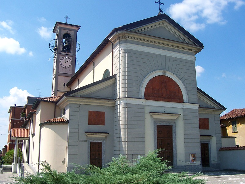 Ornago - Chiesa Parrocchiale di S. Agata